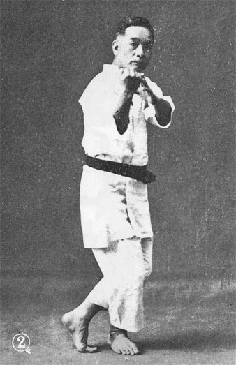 知花朝信のパッサイ(Chibana Choshin, 1885 - 1969)